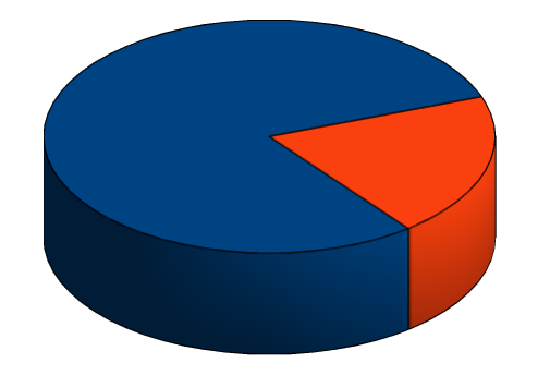 Принцип Парето 20/80.